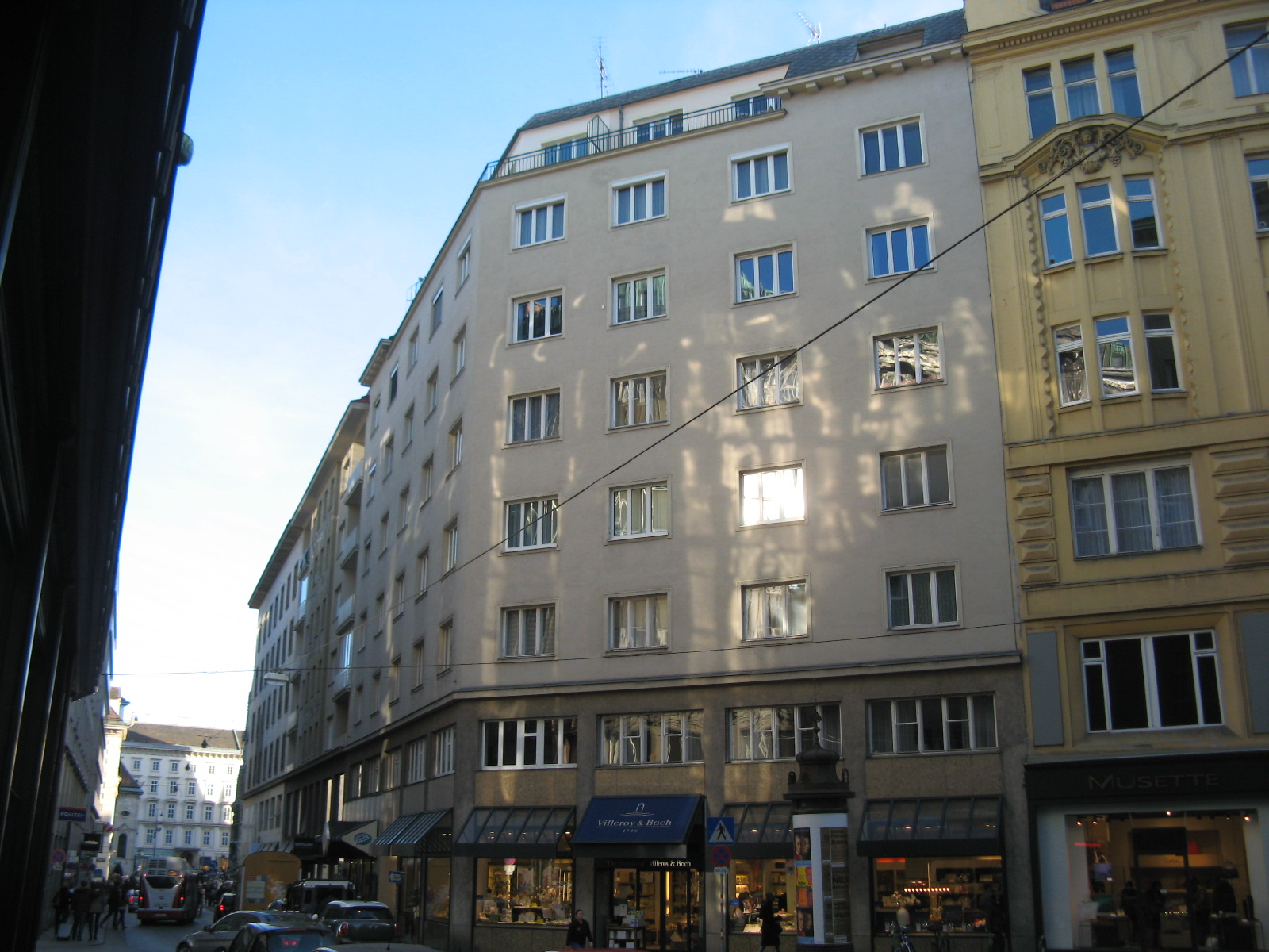 Haus Brandstätte 5, Wien-Innere Stadt